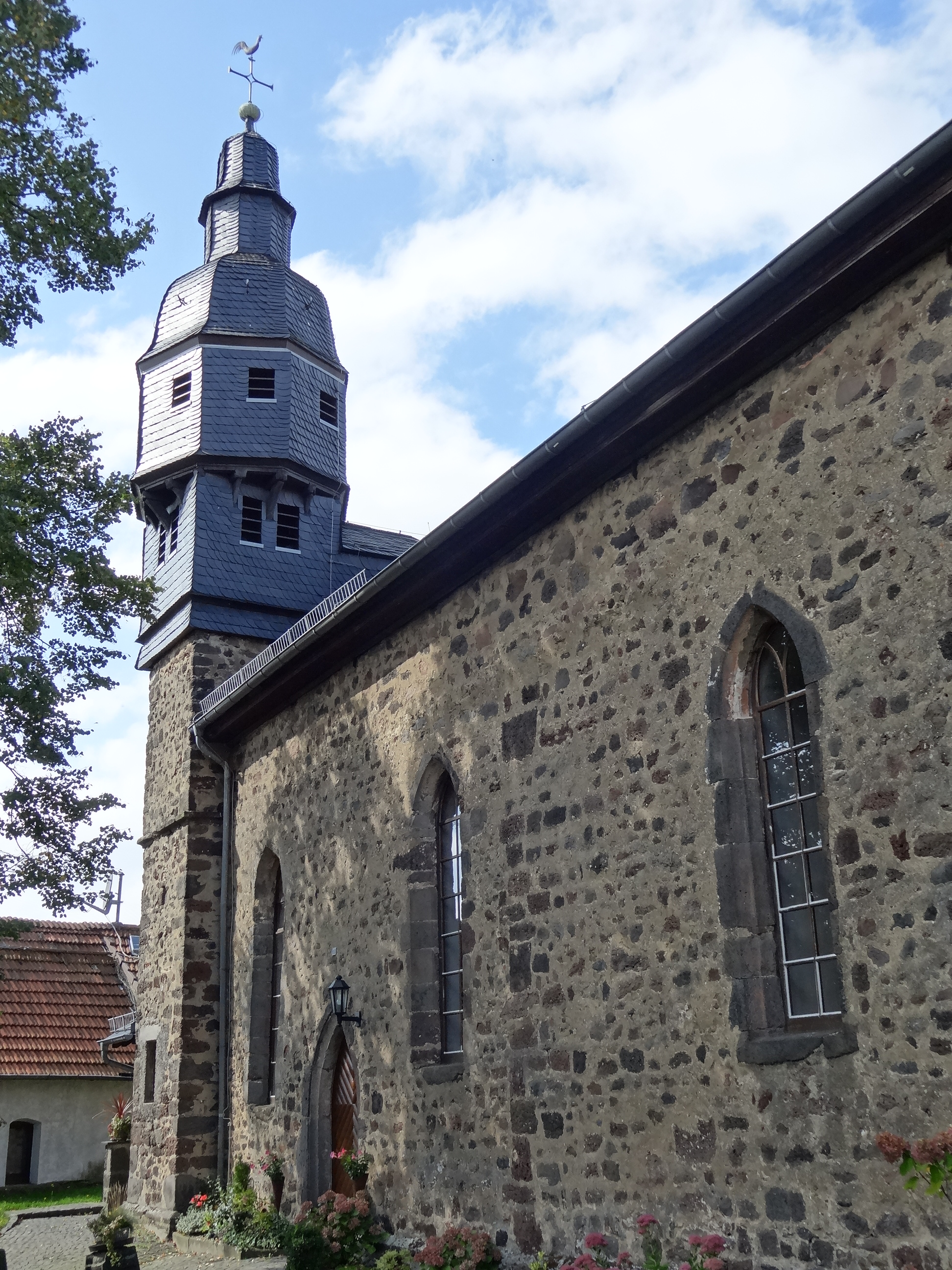 Evangelische Kirche (Burkhardsfelden)